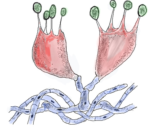 Zeichnung einer Basidie.